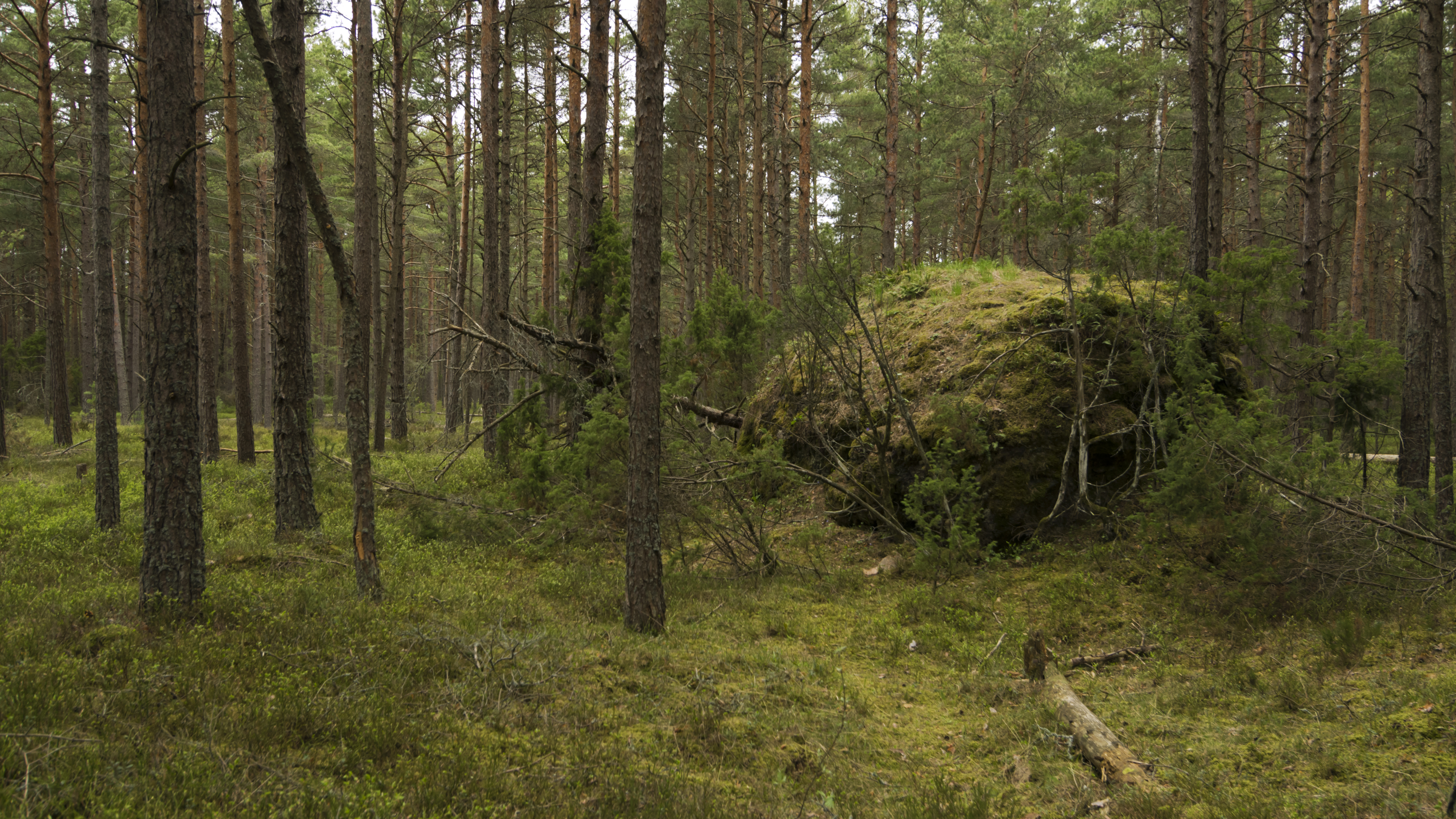 Dirhami rahn, Nõva-Osmussaare hoiuala